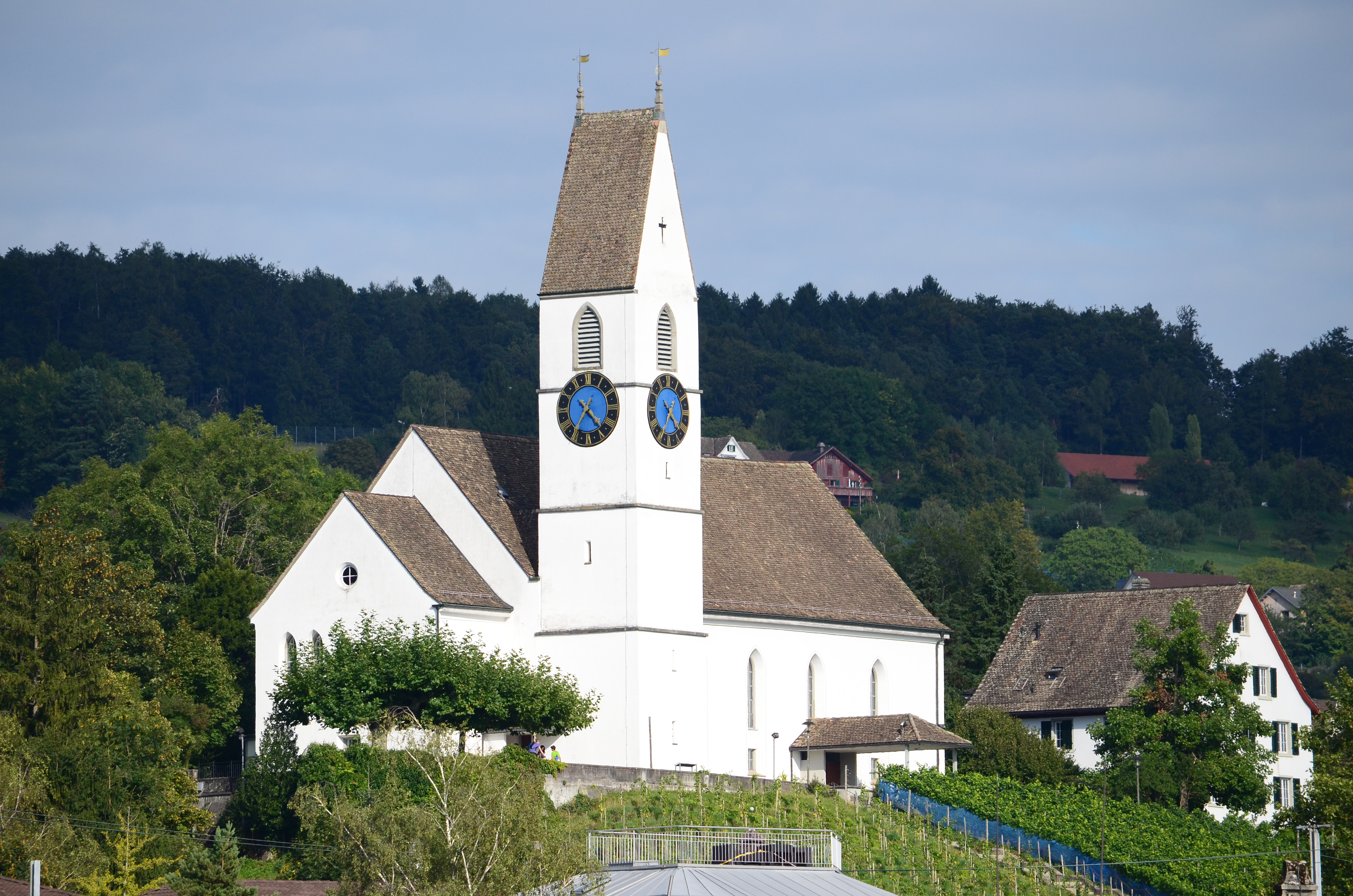 Reformierte Kirche in Männedorf as seen from Zürichsee-Schiffahrtsgesellschaft (ZSG) paddle steamer Stadt Rapperswil on Zürichsee in Switzerland